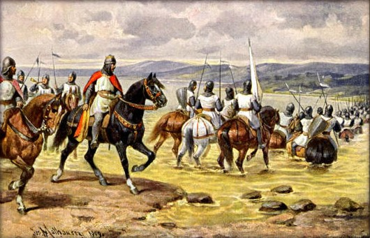 Josef Mathauser - Čechové překračují řeku Addu roku 1158